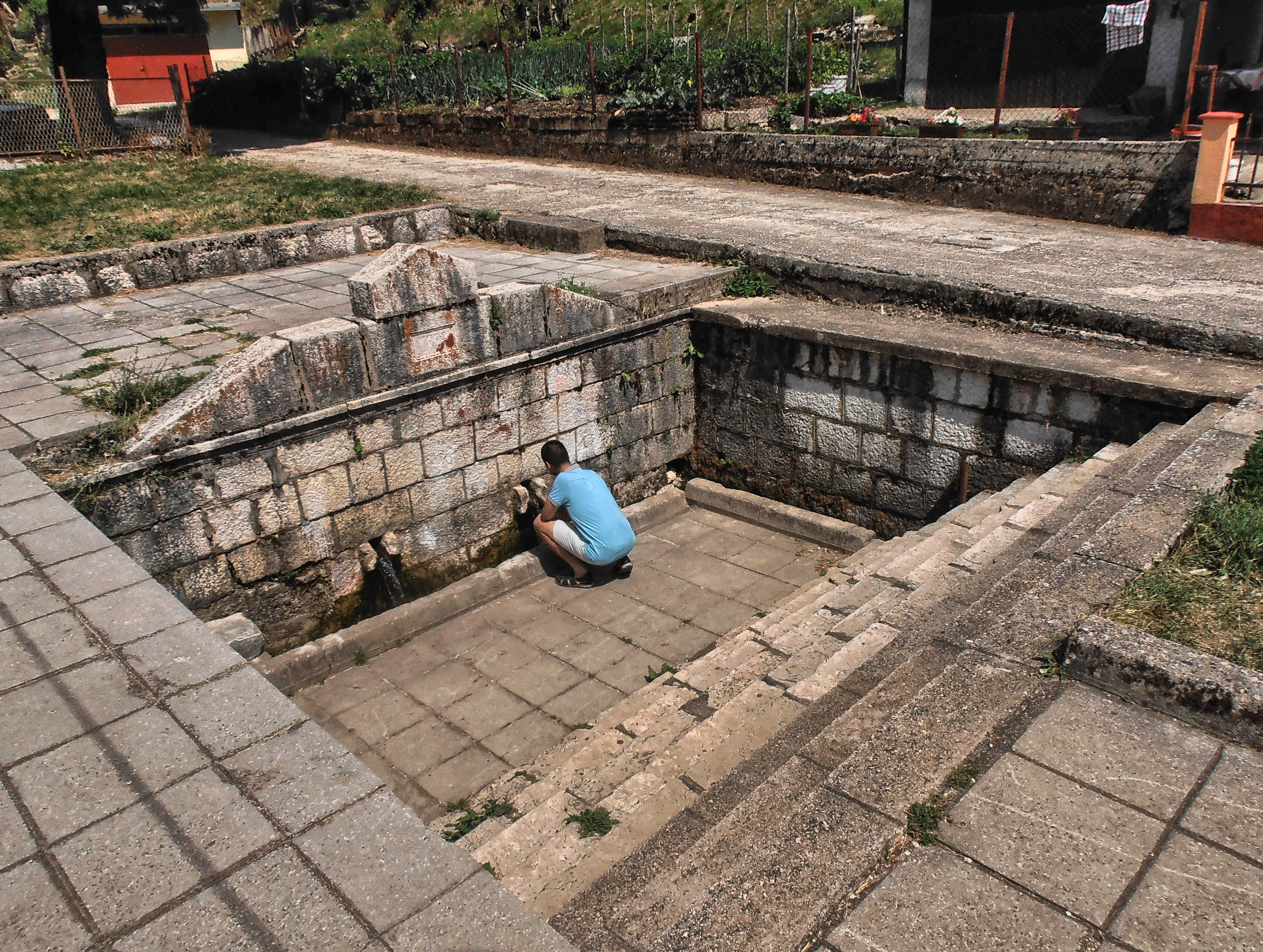 NKD358 Preuzeto sa , iz teksta Zaborvljeno Gacko (u kome postoji slika starog izgleda česme):,,Nije mu ime Slavljanski potok, kako bi se u Gacku znalo čuti. Jer da je tako ne bi kuće u tom naselju sa istim imenom, zvali kućama u Potoku. Živim u Potoku, znali bi reći ,za sebe, stanovnici tog naselja. Negdje krajem šezdestih godina, konjičko preduzeće „Bujice“ je izvršilo regulaciju ovog napasnika Čaršije. Naime , kod velikih , obilnih , a posebno naglih kiša, ovaj potok što počinje u najvišim tačkama gatačke gornje čaršije, ispod Mućevića (ili Mucovića nisam siguran šta je ispravno) stijena bi redovno plavio centar mjesta.On protiče prirodnom udolinom koja je smještena sa zapadne strane od kuća Drljevića, te sa istočne strane od kuća Kurtovića. Kojih stotinjak metara sjeverno od izvora Slavljan dobija izgled uredjene bujice i protiče pored pijace , zapadno od lokacije stare benzinske stanice u centru Gacka, pored hotela „Metohija“, pa sve do klaonice na zadnjim južnim tačkama grada. Sve do kraja pedesetih godina , on je bio totalno otvoren, cijelom svojom dužinom. Tih godina je, zbog izgradnje benzinske pumpe zatvoren njegov dio od mosta na južnom kraju pijace (lokacija bivše mesnice), sve do mosta , koji je na njemu bio na komunikaciji iz pravca Mostara u pravcu Avtovca. Južnu ogradu tog mosta vidite i na ovom snimku, neposredno uz desnu trafiku. Inače ovaj most je izgrađen za austrijske vladavine i dan, danas je na istoj lokaciji (ispod asfalta), no sada nema ni južne ograde mosta, koja je uklonjena sedamdesetih godina, kada je u drugoj fazi kanal zatvoren od mosta pa do kraja novosagrađenih stambenih zgrada ispod kuća Poškovića, na cesti za Kulu Fazlagića. Malo stariji Gačani će se sjetiti vremena kad je cijeli Potok bio otvoren, a kamenom izidanim stranama kanala, čiščen i održavan.I tada , a i kasnijih godina bio je omiljeno mjesto za igru gatačke mladosti." U blizini česme se na kamenu vide dva datuma 1890/1 i 1.septembar 1977.